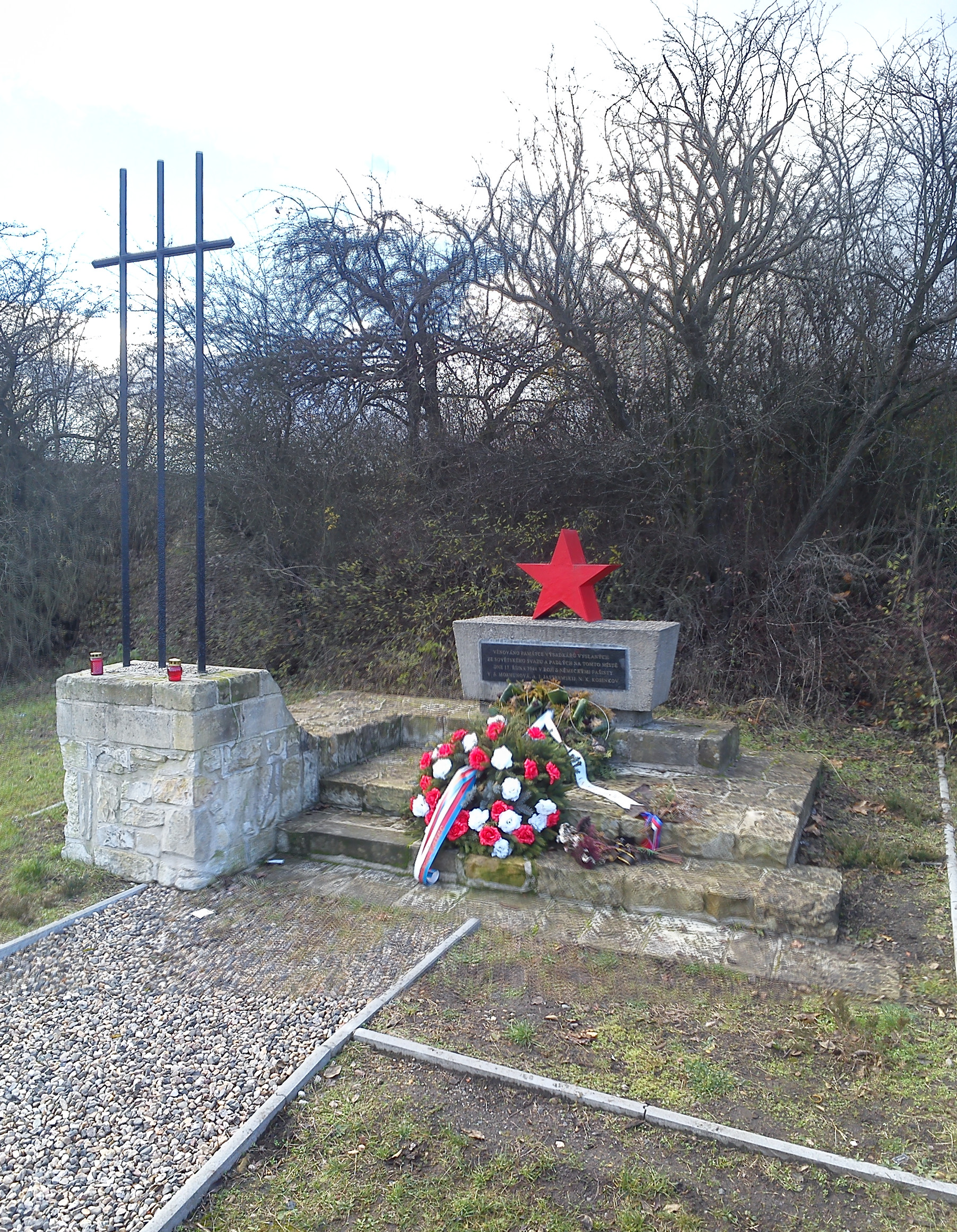 Památník pohledem zpředu od východu